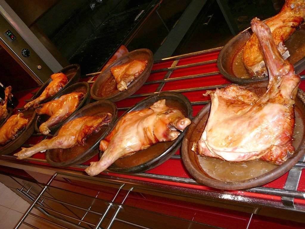 Cochinillo, restaurante asador Acebo, Vilaxoan